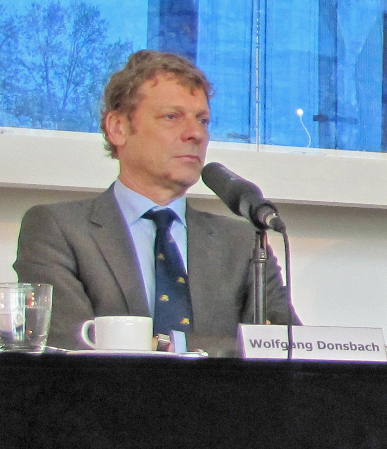 Wolfgang Donsbach, Professor Für Kommunikationswissenschaft an der Technischen Universität Dresden, bei den Römerberggesprächen in Frankfurt am Main im Mai 2013.